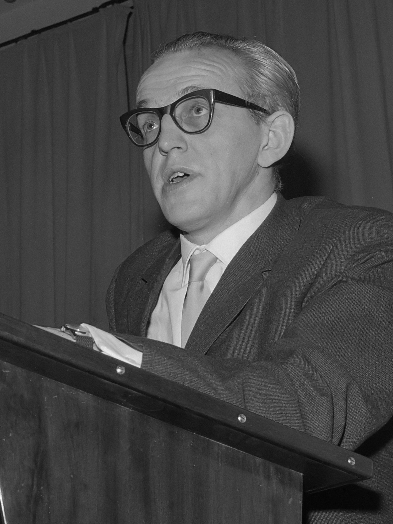 Twaalfde Lustrum KNJK in Amsterdam, Lucker, hoofredacteur Volkskrant 10 november 1962